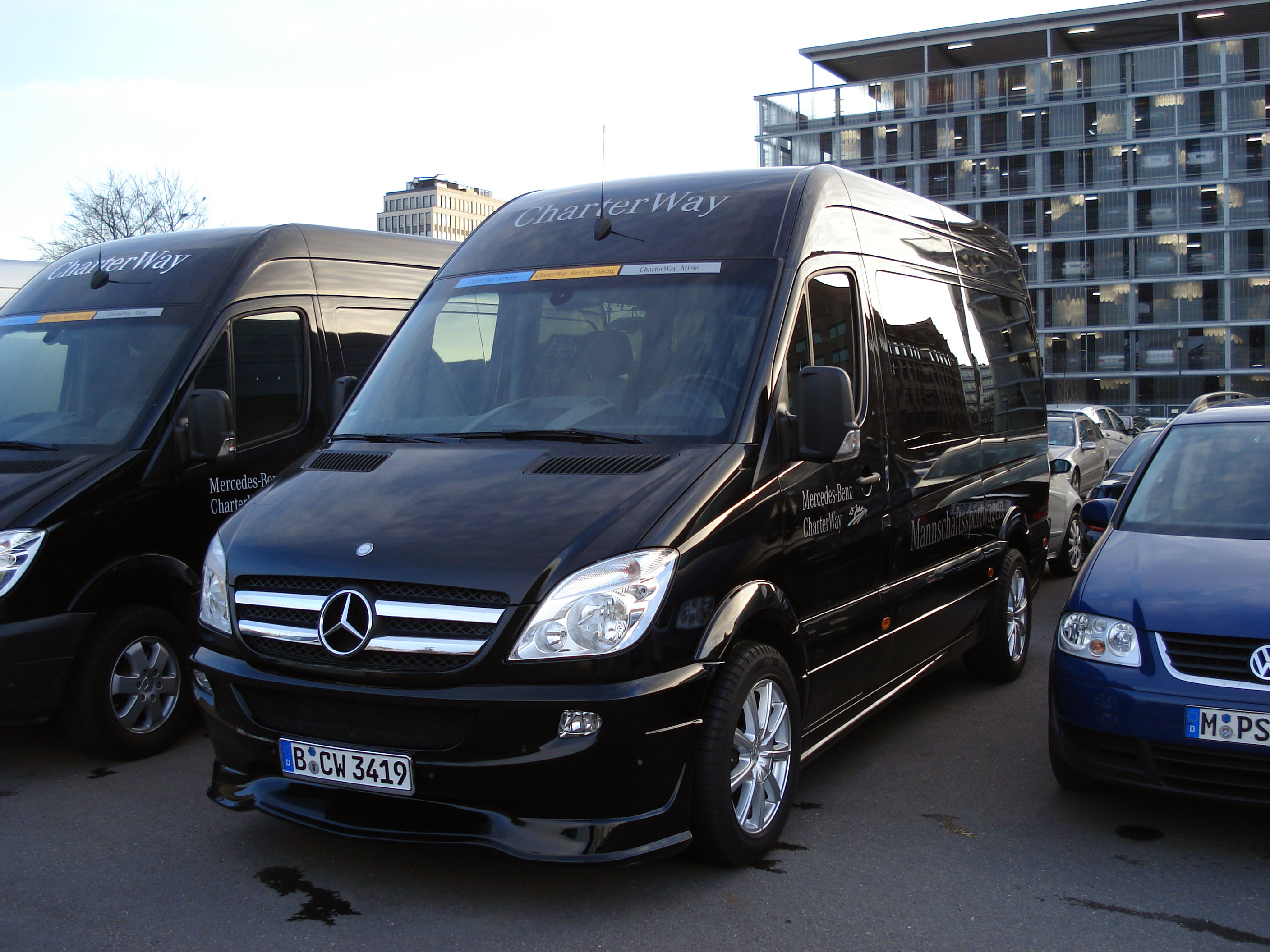 Mercedes-Benz Sprinter